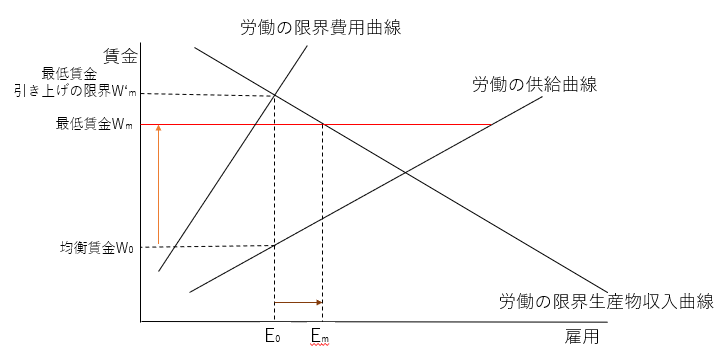 需要独占の状況においては、引き上げの限界までは、最低賃金を引き上げたとしても、雇用が減少するわけではない。